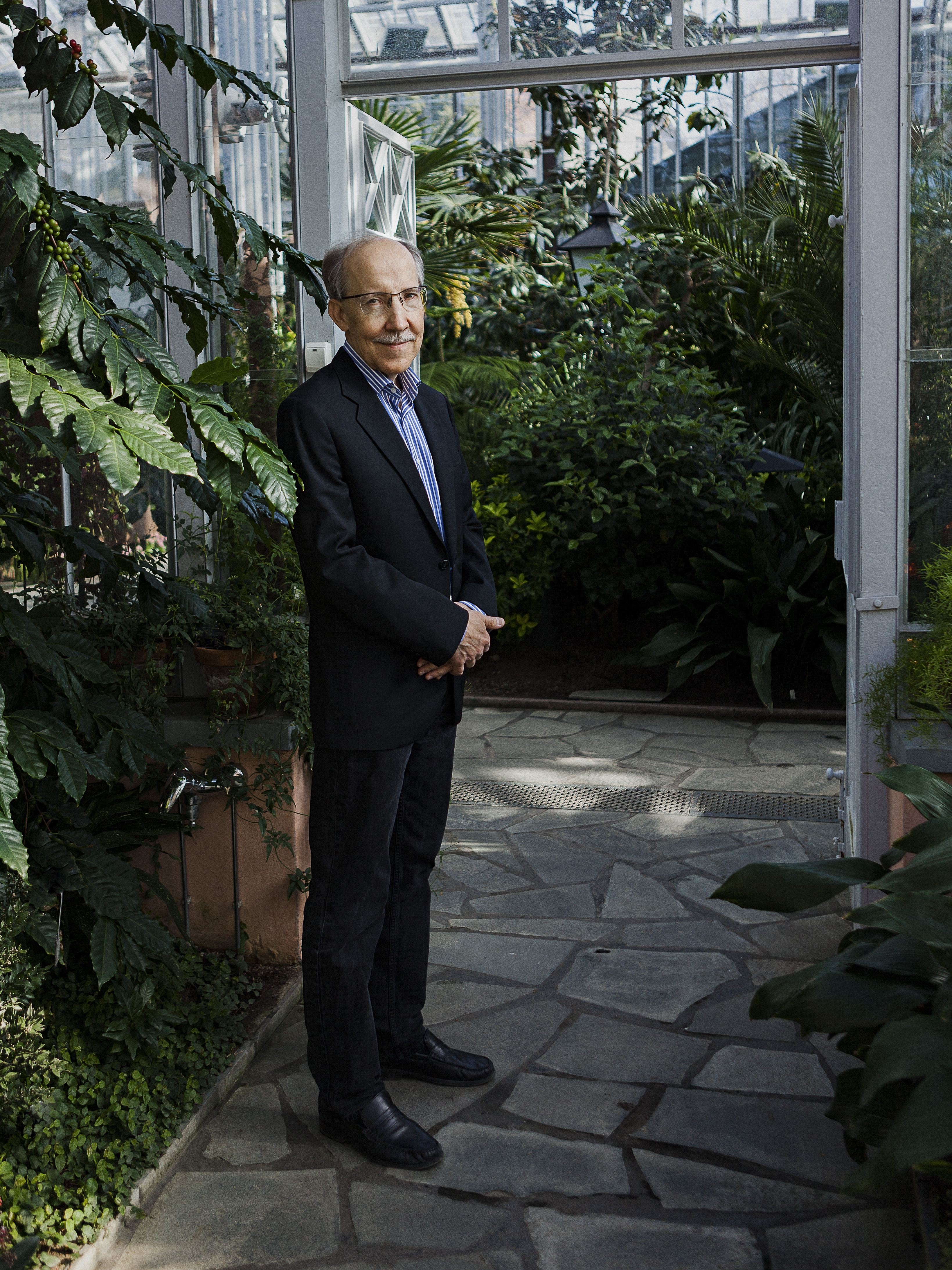 Kari Alitalo, Academiehoogleraar moleculaire biologie van kanker aan de Universiteit van Helsinki (Finland), krijgt de Dr. A.H. Heinekenprijs voor Geneeskunde 2014 voor zijn pionierswerk in het onderzoek naar hoe en wanneer lymfe- en bloedvatstelsels groeien, en hoe die kennis kan helpen bij het behandelen van kanker en andere ziekten. Bij gebruik van de foto's is naamsvermelding van de fotograaf verplicht: Jussi Puikkonen/KNAW.